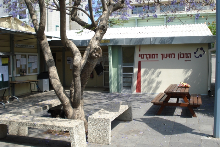 חצר המכון לחינוך הדמוקרטי ו"עץ הדמוקרטים" בסמינר הקיבוצים